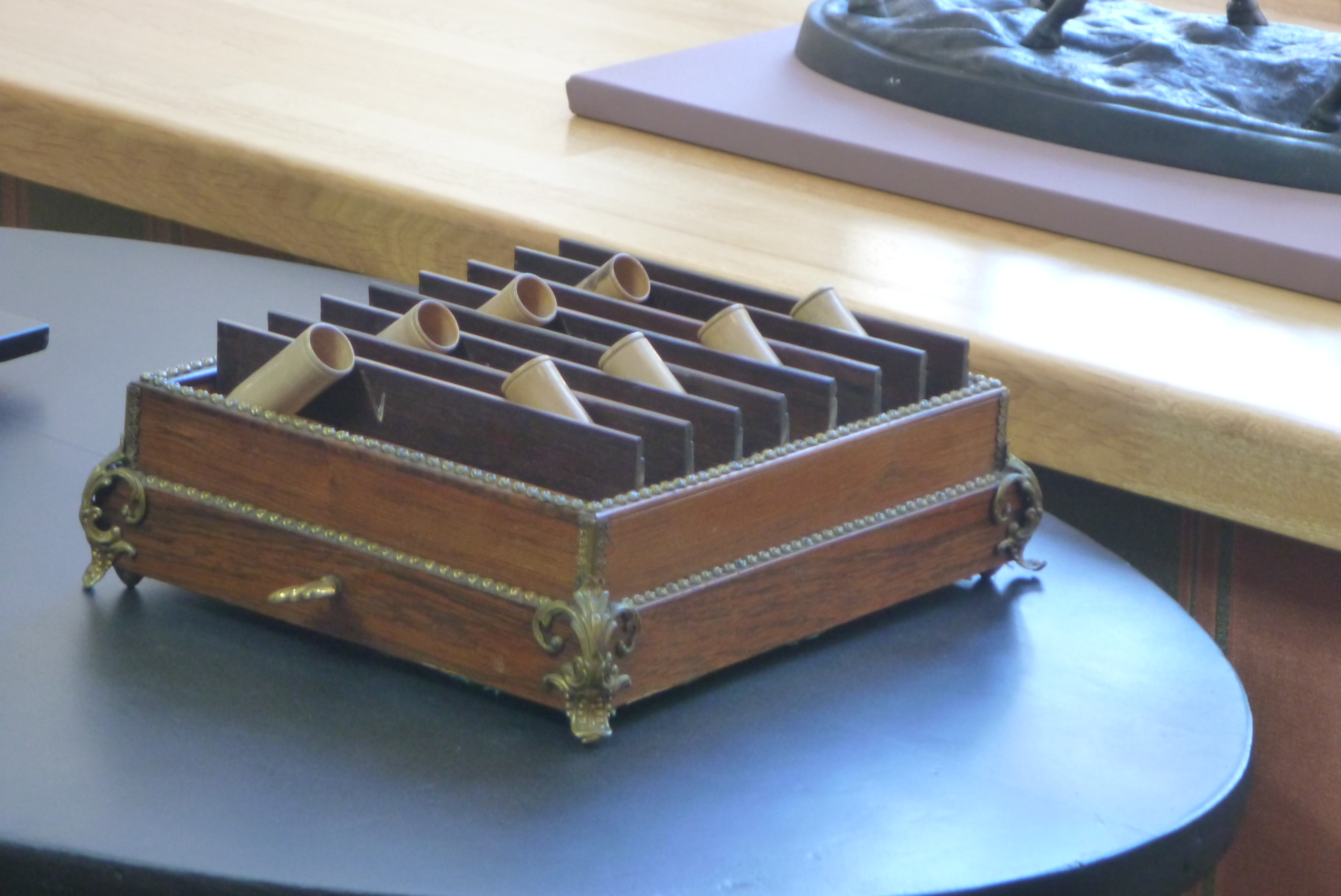 Сигарный ящик на Демидовской даче, Нижний Тагил 8 июня 2019 года